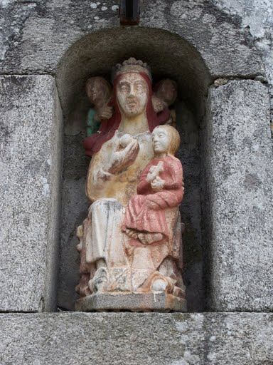 Talla en piedra policromada del s. XIV de la Virgen y el niño